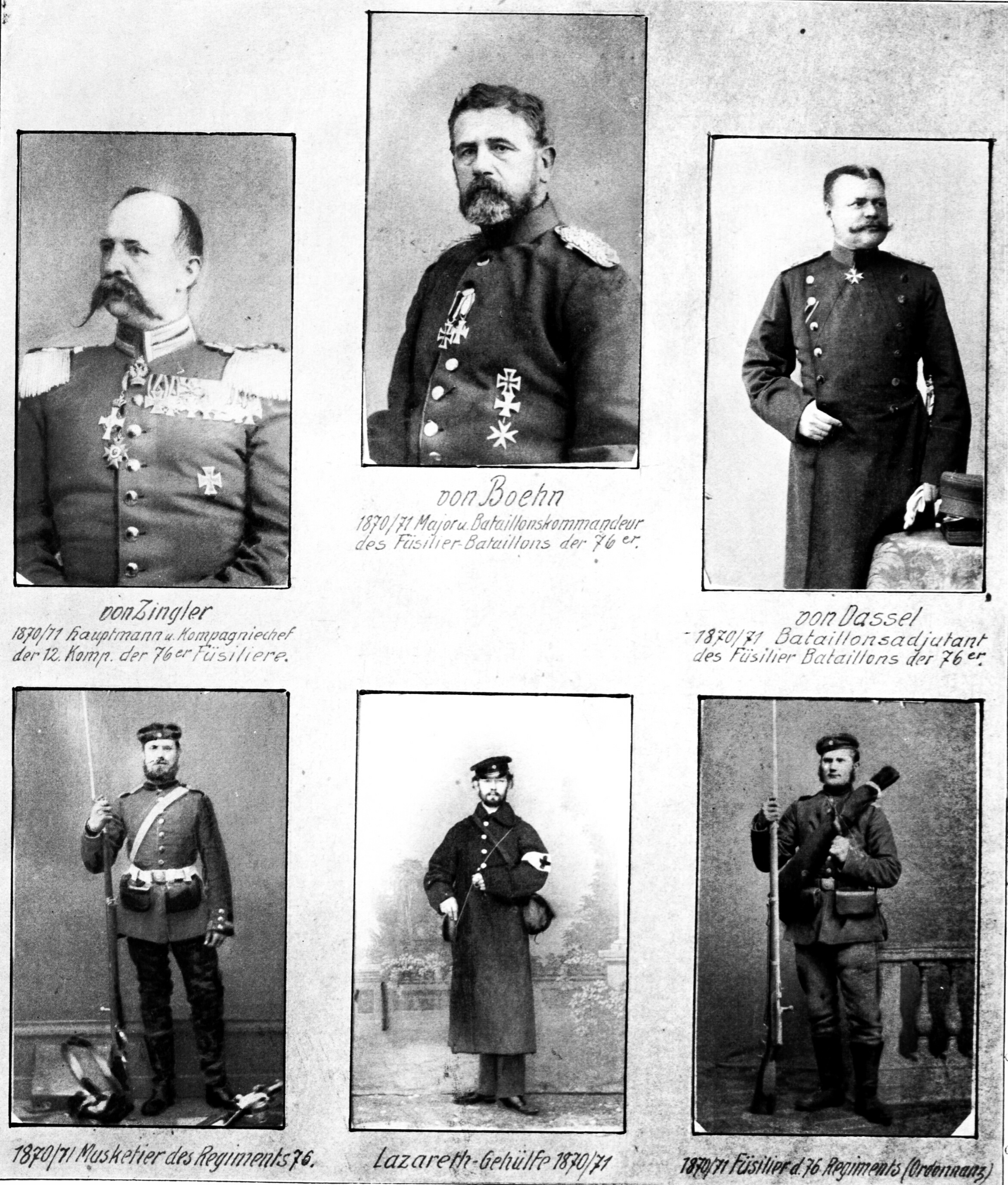 Mitglieder des Lübecker Füsilierbataillons zur Zeit des Deutsch-Französischen Krieges